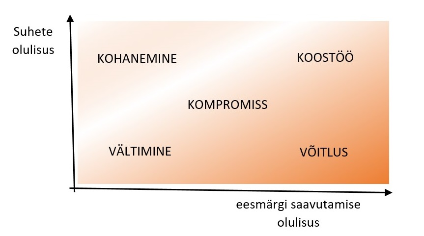 Viis tüüpilisemat viisi reageerida konfliktile ehk käituda konflikti puhul